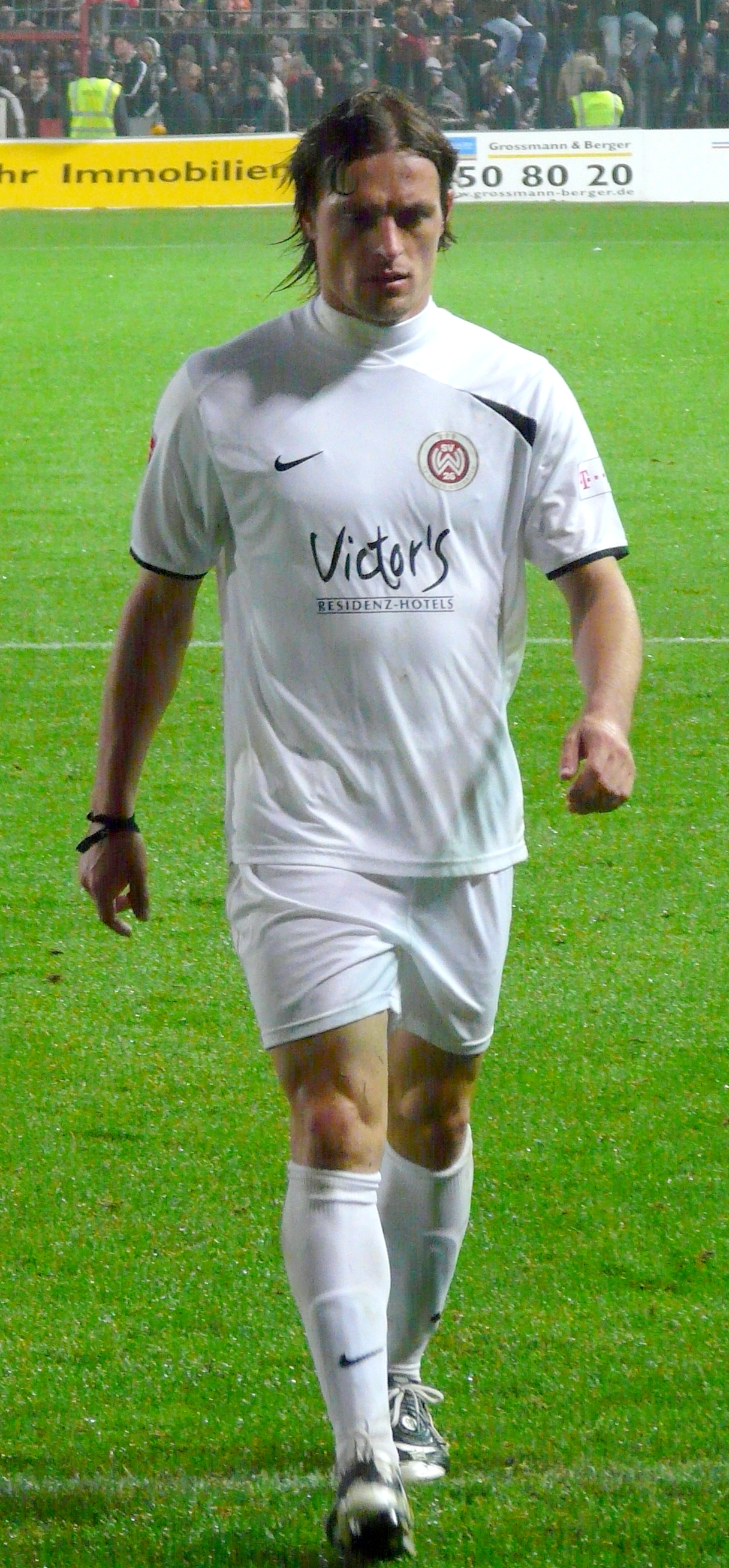 Ales Kokot